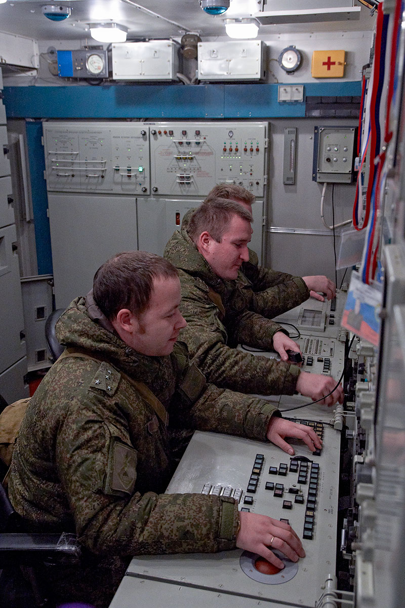 Приведение в боевую готовность расчётов ЗРС С-400 «Триумф» 1488-го зенитного ракетного Краснознаменного полка в Ленинградской области.